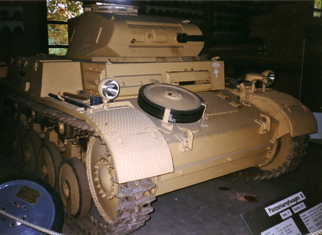 Panzerkampfwagen II Ausf. F, ausgestellt im Panzermuseum Munster